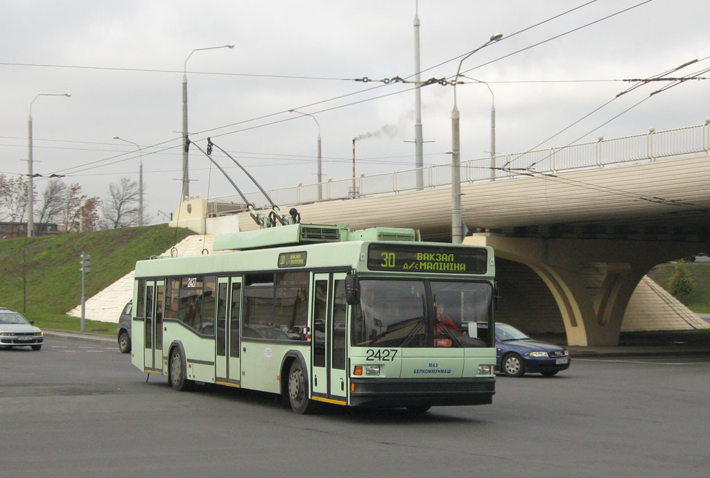 Троллейбус MAZ-103T на маршруте №30 Вокзал-ДС Малинина, Минск, Белоруссия